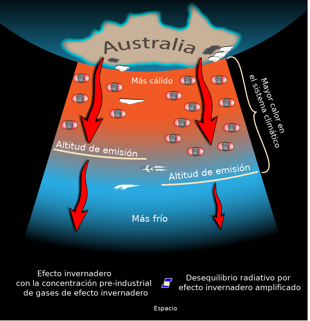 Desequilibrio radiativo por efecto inverandero amplificado